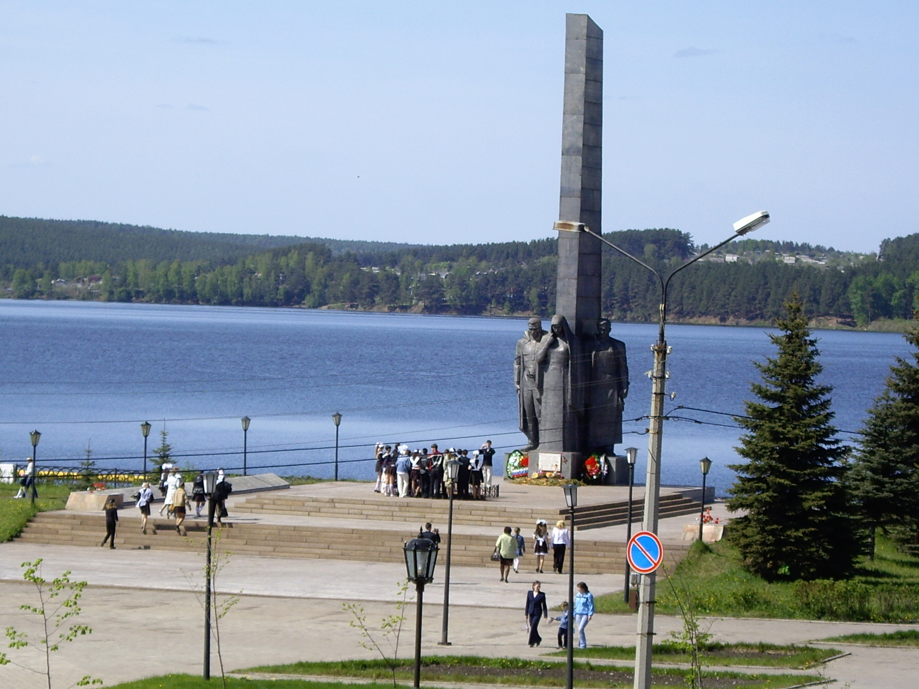 Режевской Монумент Трудовой и Боевой славы